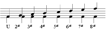 Intervalos en número. Traducción basada en (This image is ineligible for copyright and therefore is in the public domain, because it consists entirely of information that is common property and contains no original authorship.)